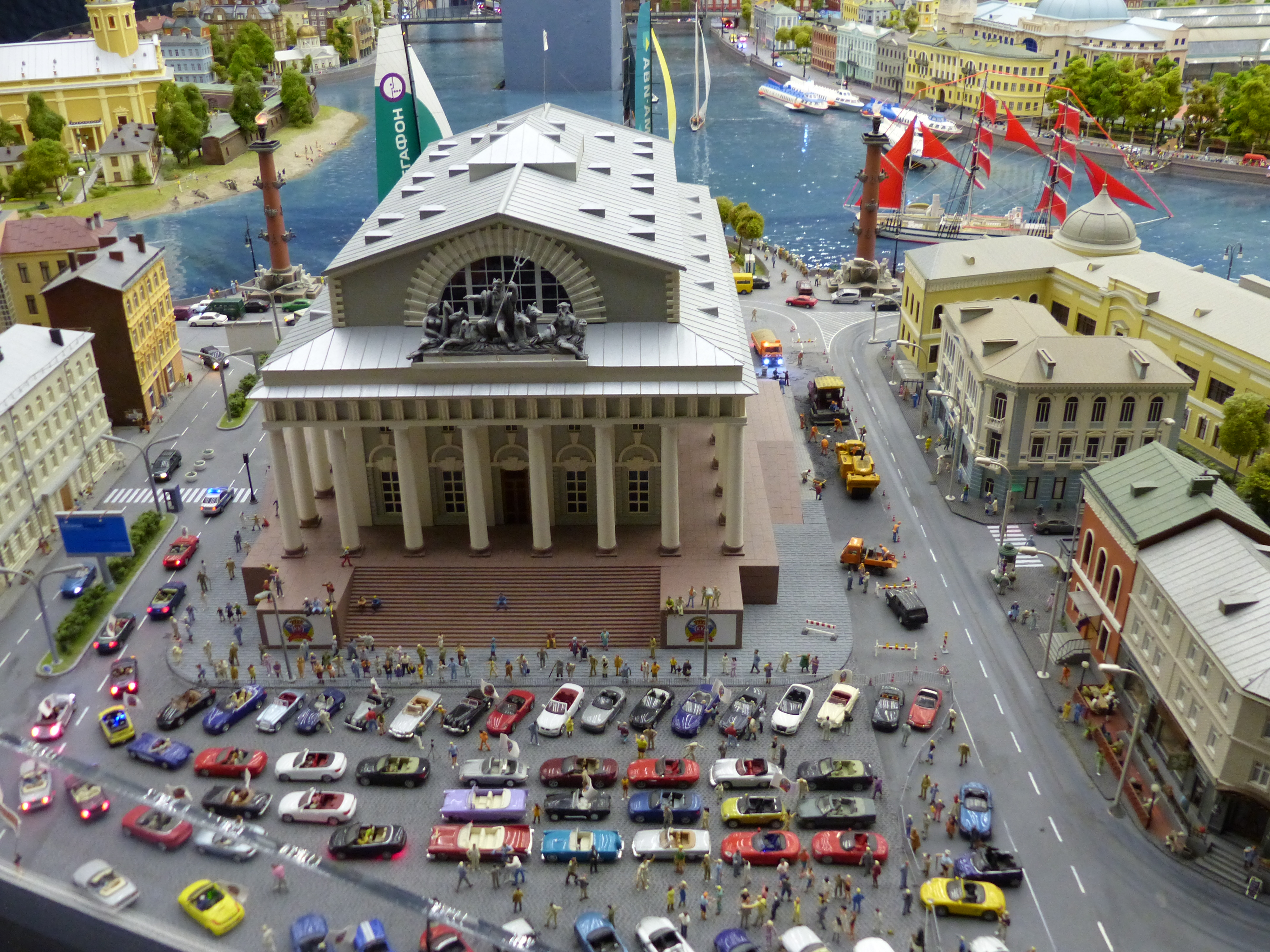 Grand Maket de Rusia, San Petesburgo